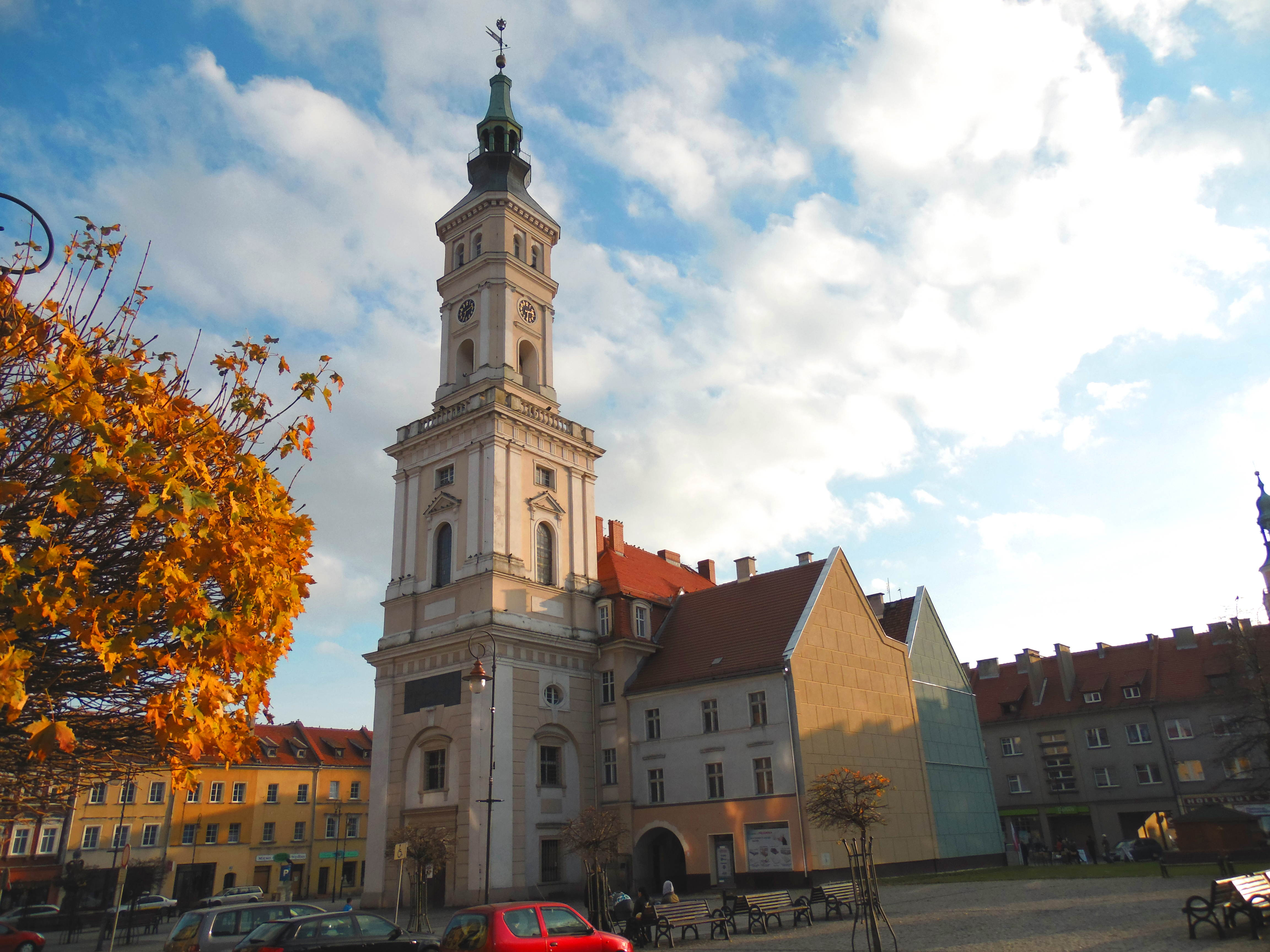 Prudnik, ratusz (XVIII w., 1840) 10.1958. Pierwotnie miała polski napis, został zlikwidowany za Fryderyka II na jego koszt